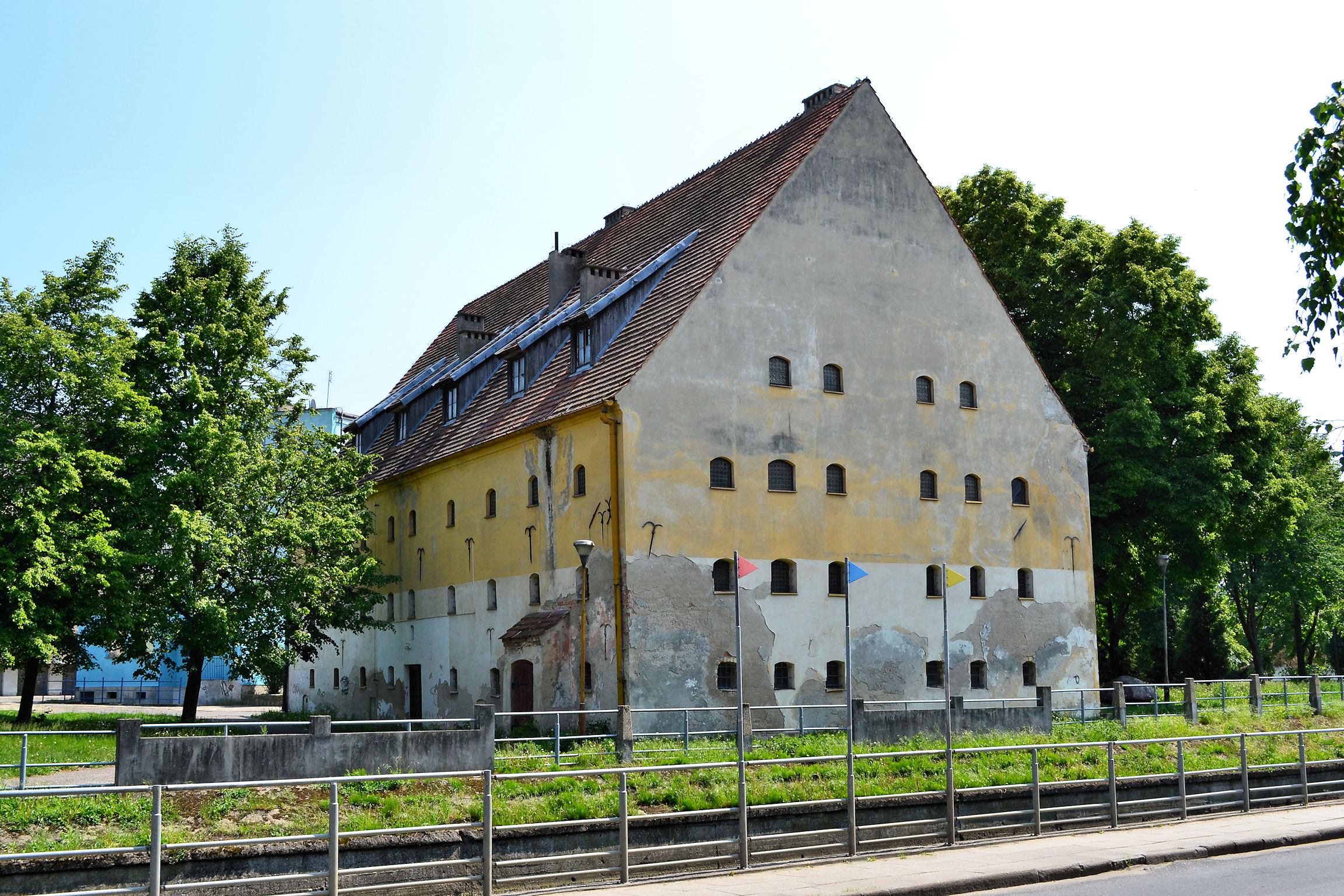 Spichlerz w Stargardzie Szczecińskim